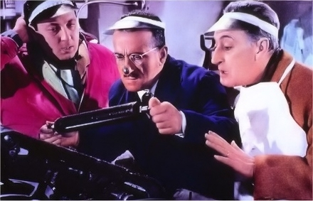 Totò nelle immagini dei suoi film